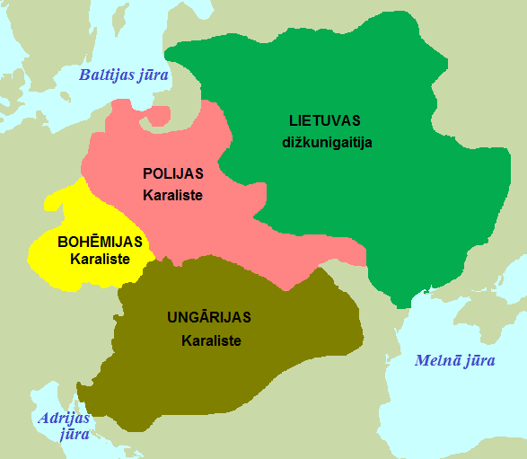 Viduseiropas karte ar valstīm, kurās valdīja Jagellonu dinastijas pārstāvji — Lietuva, Polija, Čehija, Ungārija (ap 1490—1526).